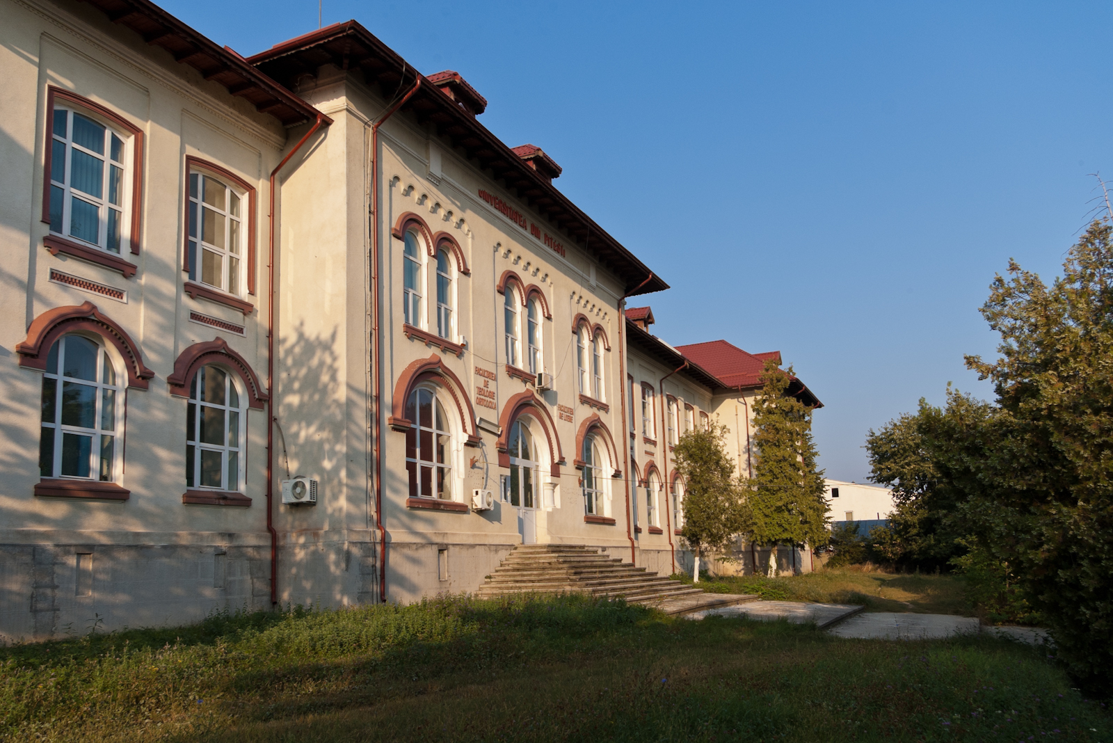 Fotografia prezinta intrarea principala in cladirea fostului Institut Pedagogic din Pitesti.